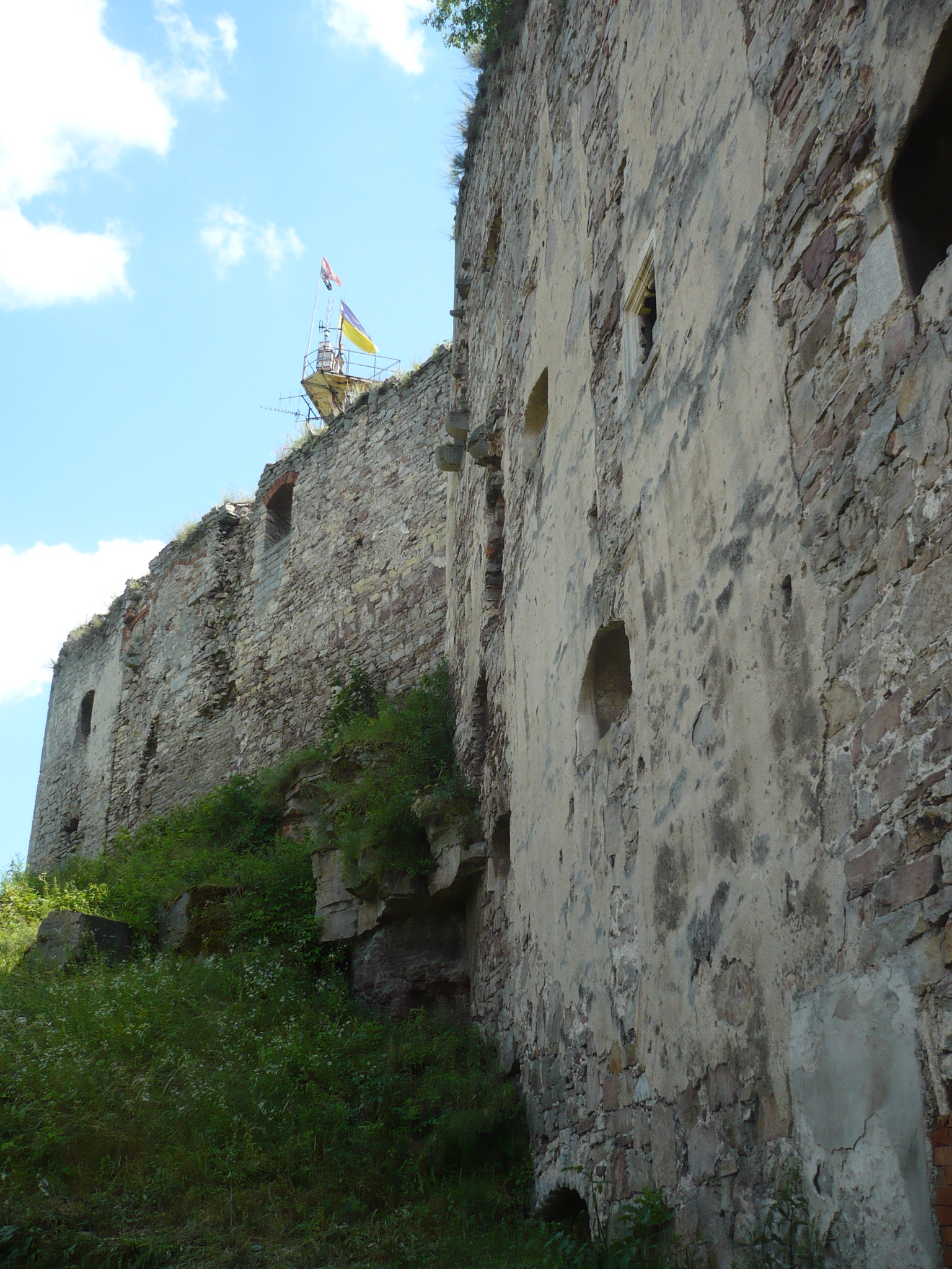 Jazłowiec. Zamek